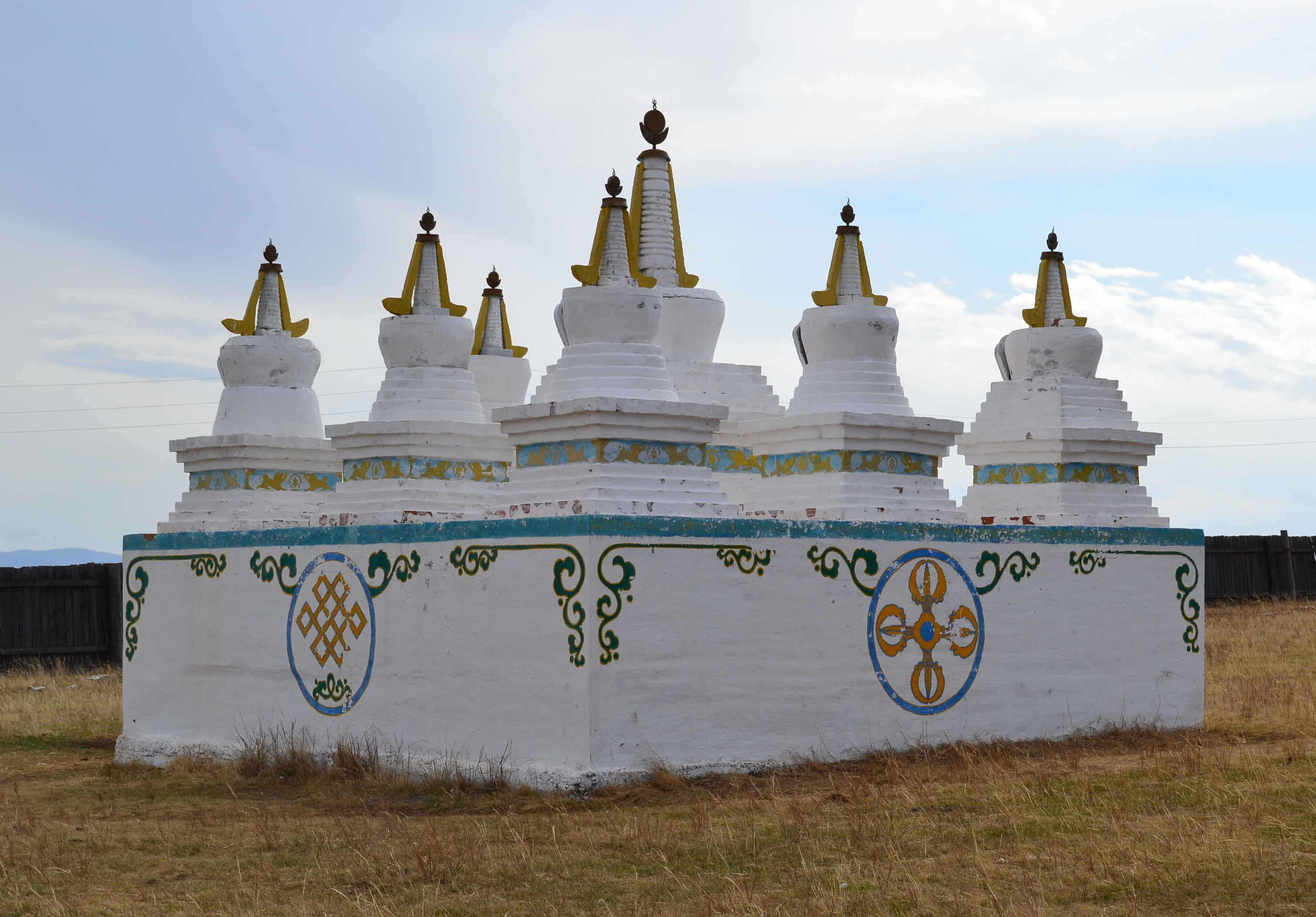 Сартул-Гэгэтуйский дацан, село Гэгэтуй, Джидинский район, Республика Бурятия